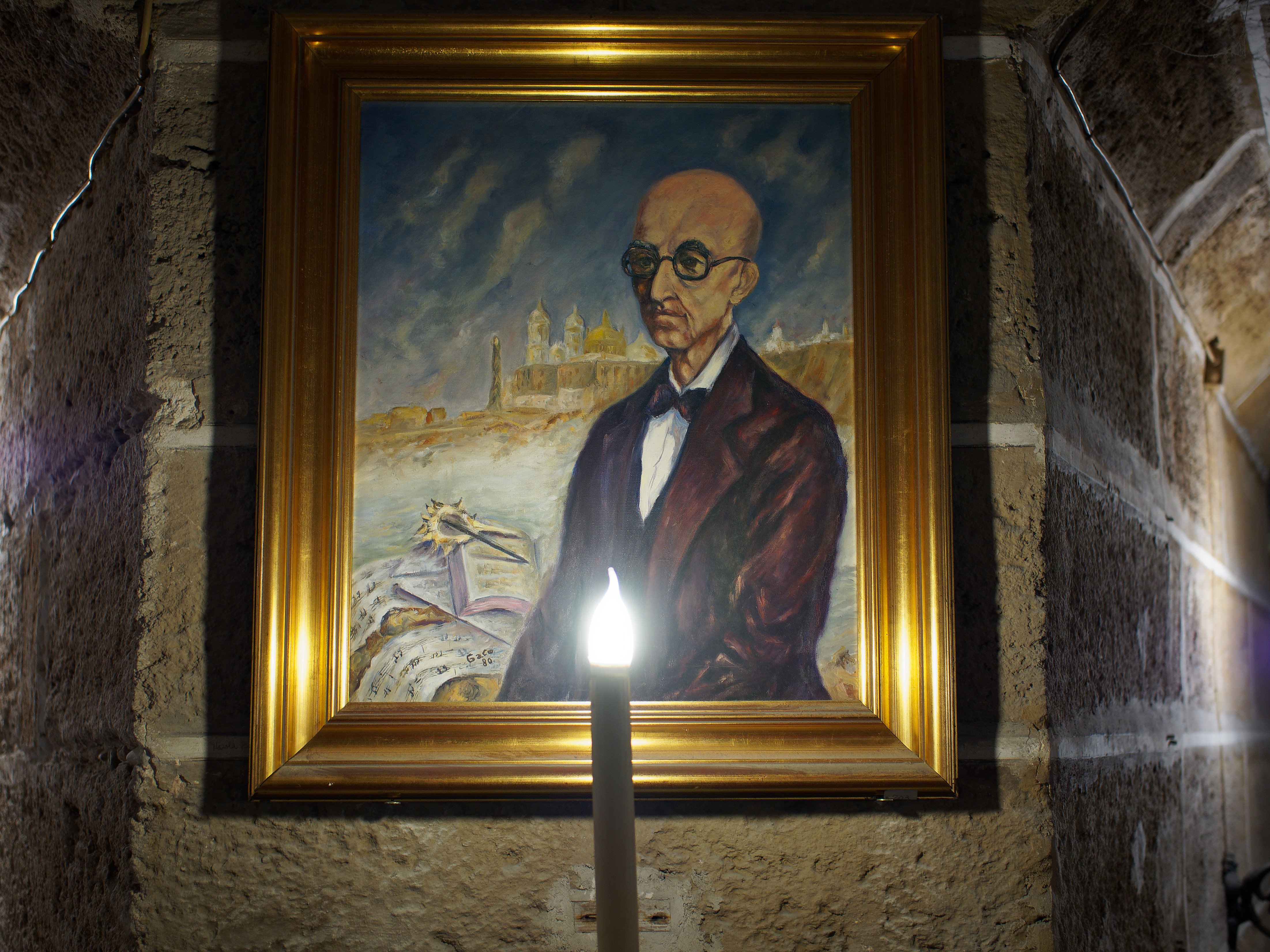 Potraitgemälde mit dem Komponisten Manuel de Falla in der Krypta der Kathedrale Santa Cruz in Cádiz, Spanien. In der Krypta liegt auch sein Grab.